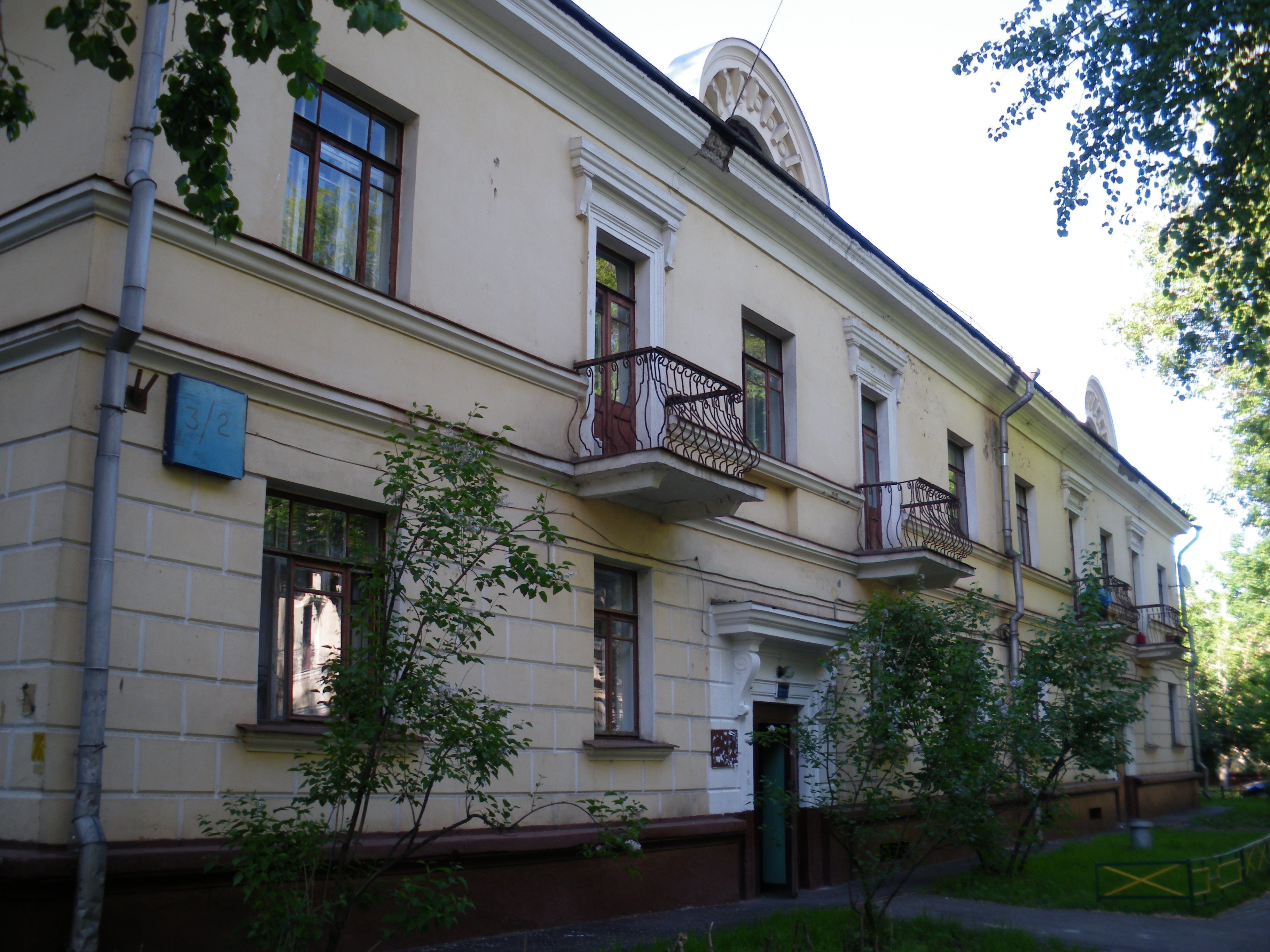 Москва, Чистопольская ул, д. 3, кор. 2